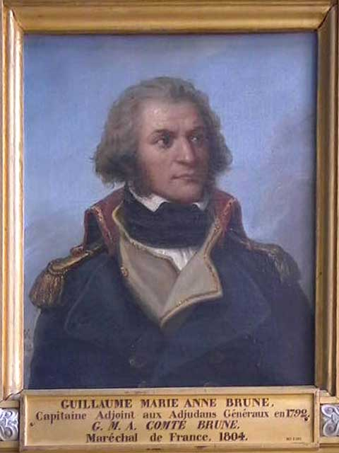 Der Marschall von Frankreich Guillaume Marie Anne Brune (1763-1815)